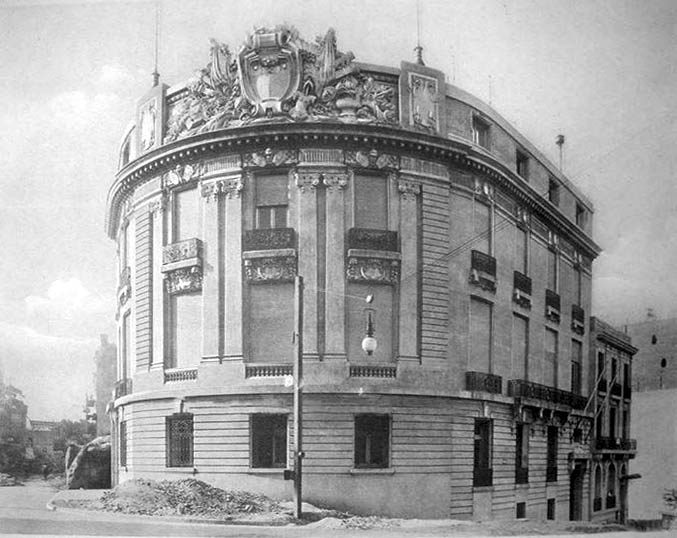 Edificio en Esmeralda y la recién abierta calle Arroyo que perteneció a la legación del Imperio Austrohúngaro. Arquitecto José (József) Markovich.